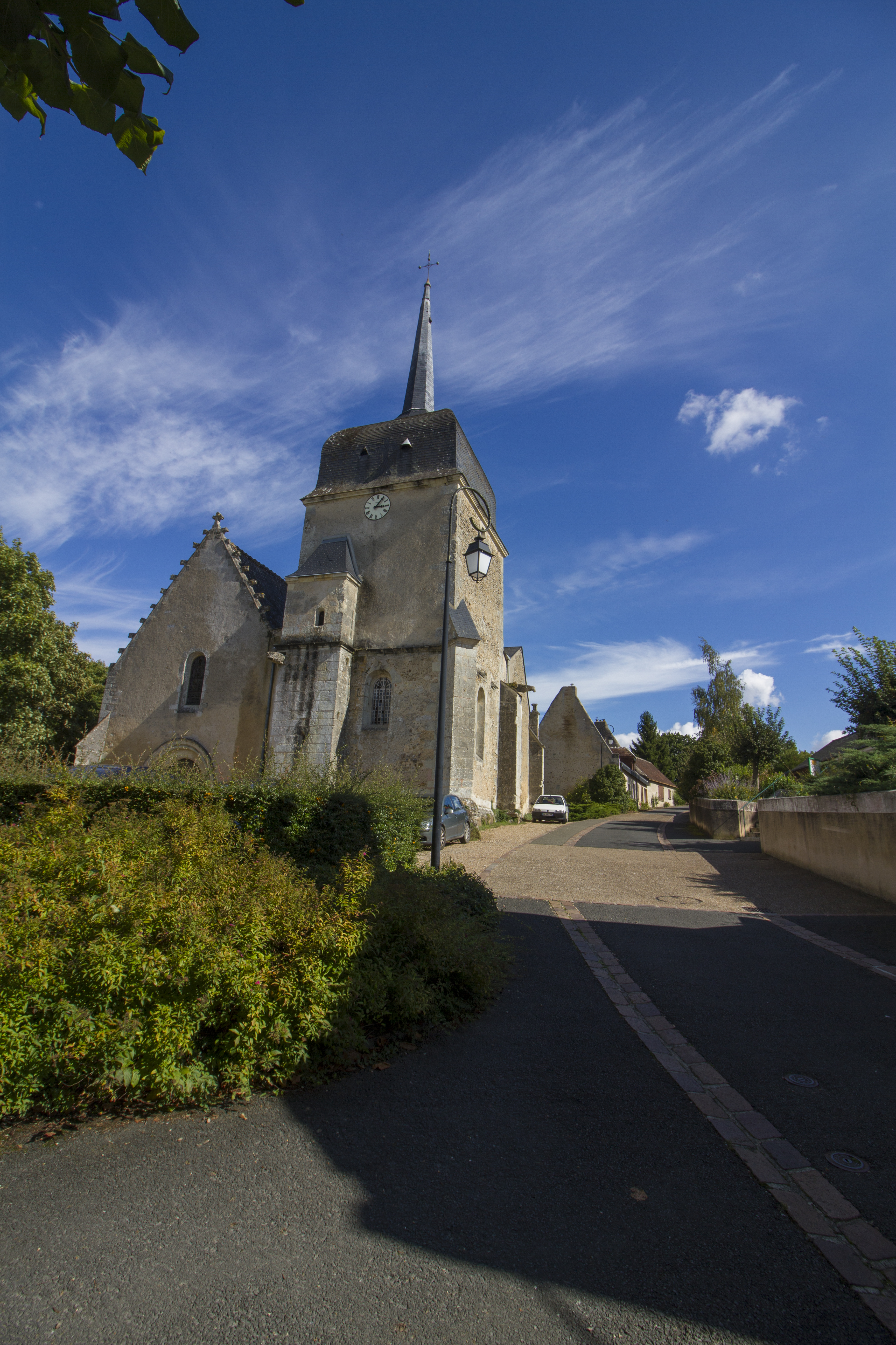 Église de Beaumont-sur-Dême